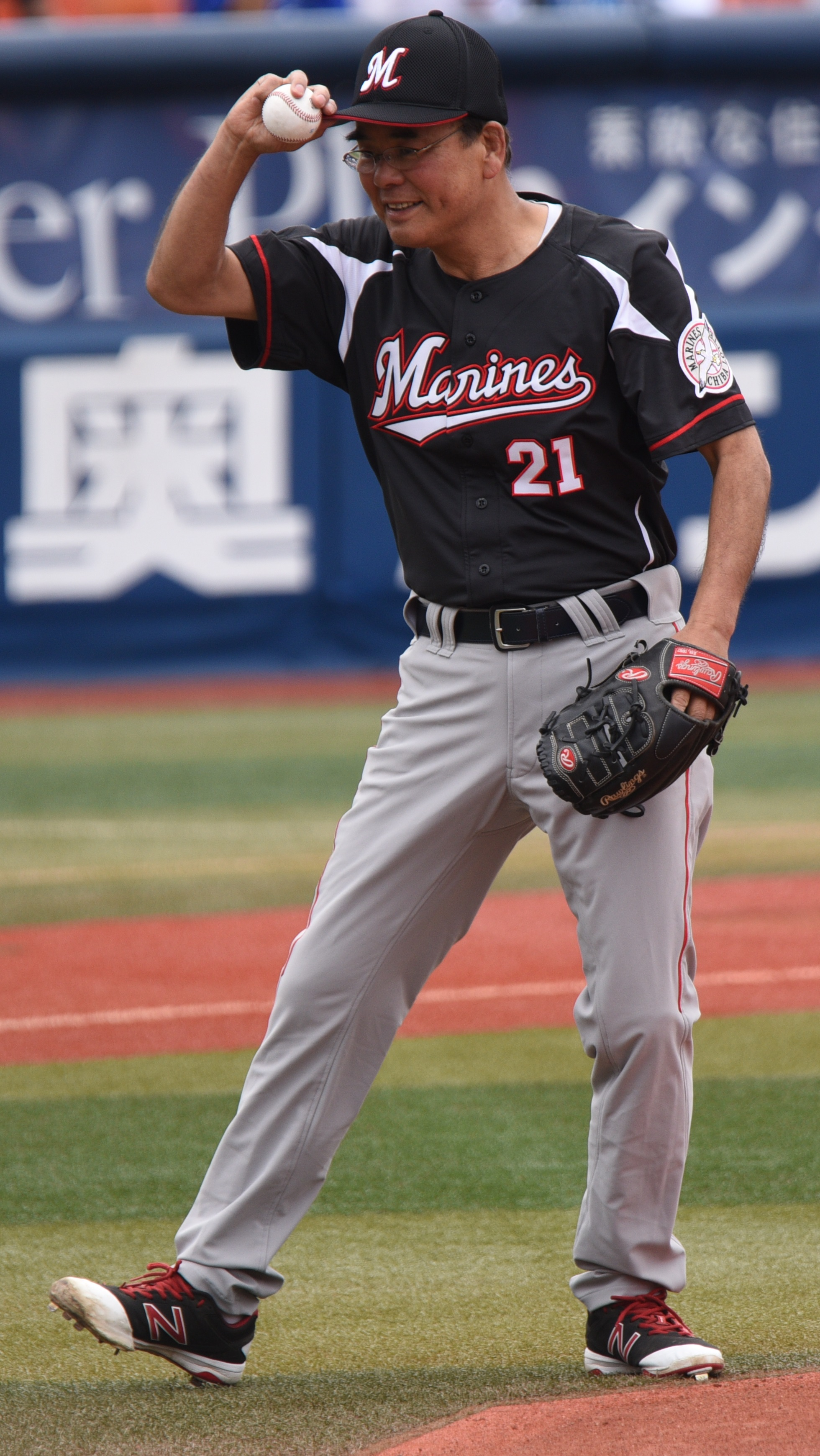 元プロ野球選手の倉持明氏。2016年６月4日、横浜DeNAベイスターズ対千葉ロッテマリーンズ第2回戦、試合前のイベントに登場。横浜スタジアムにて。